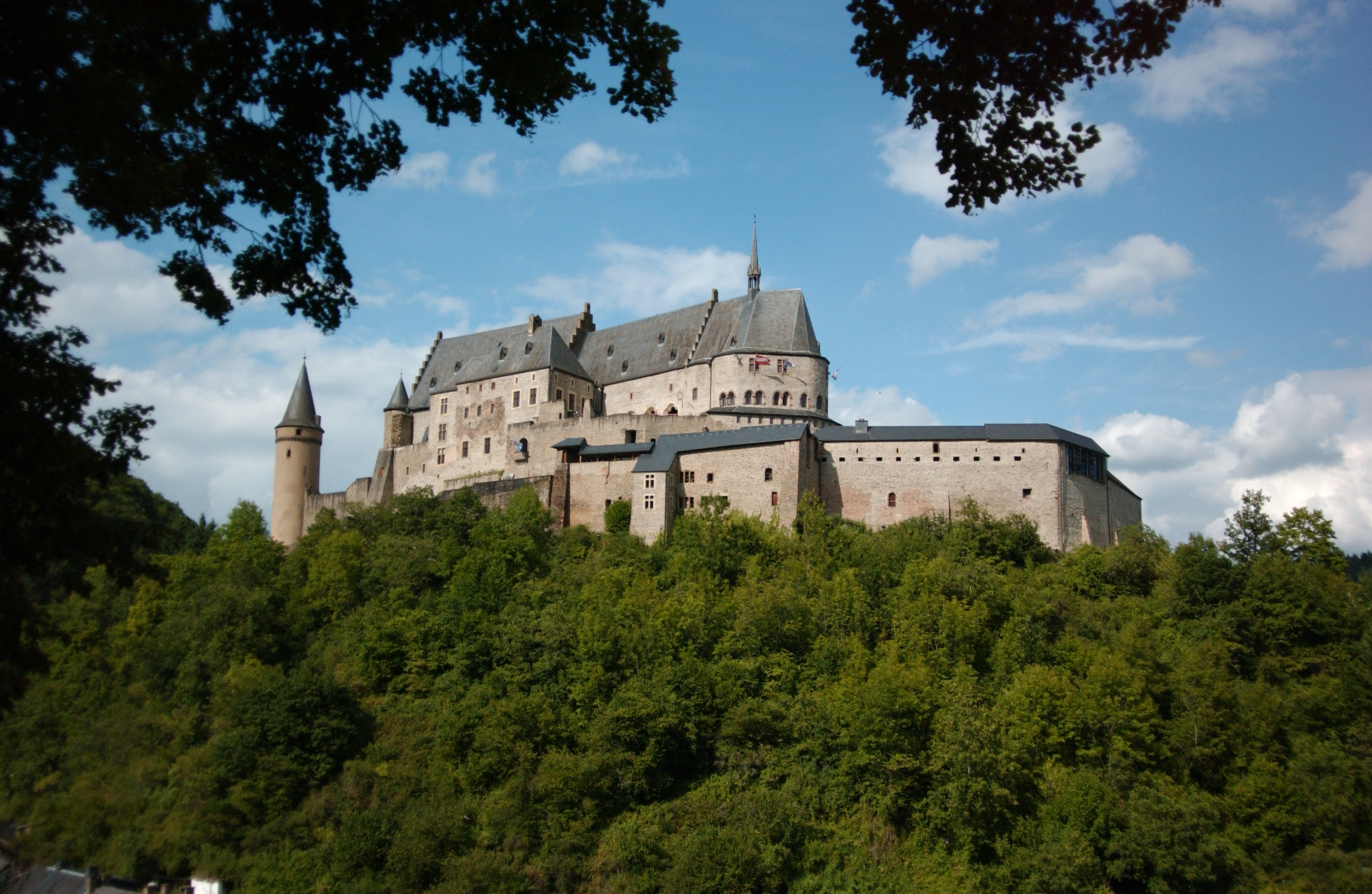 manoir des comtes de Vianden